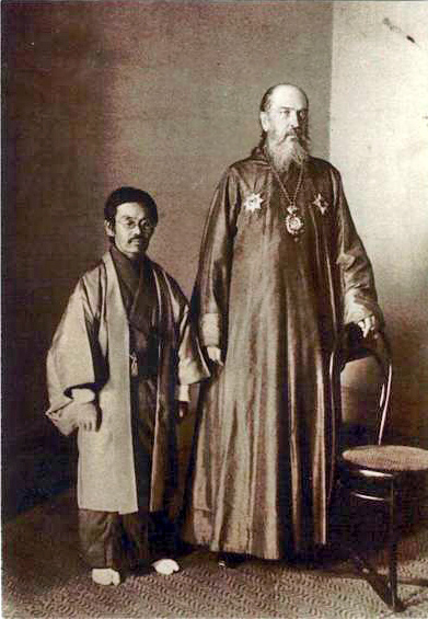 Павел Накаи и Николай Японский - переводчики священного писания на японский язык